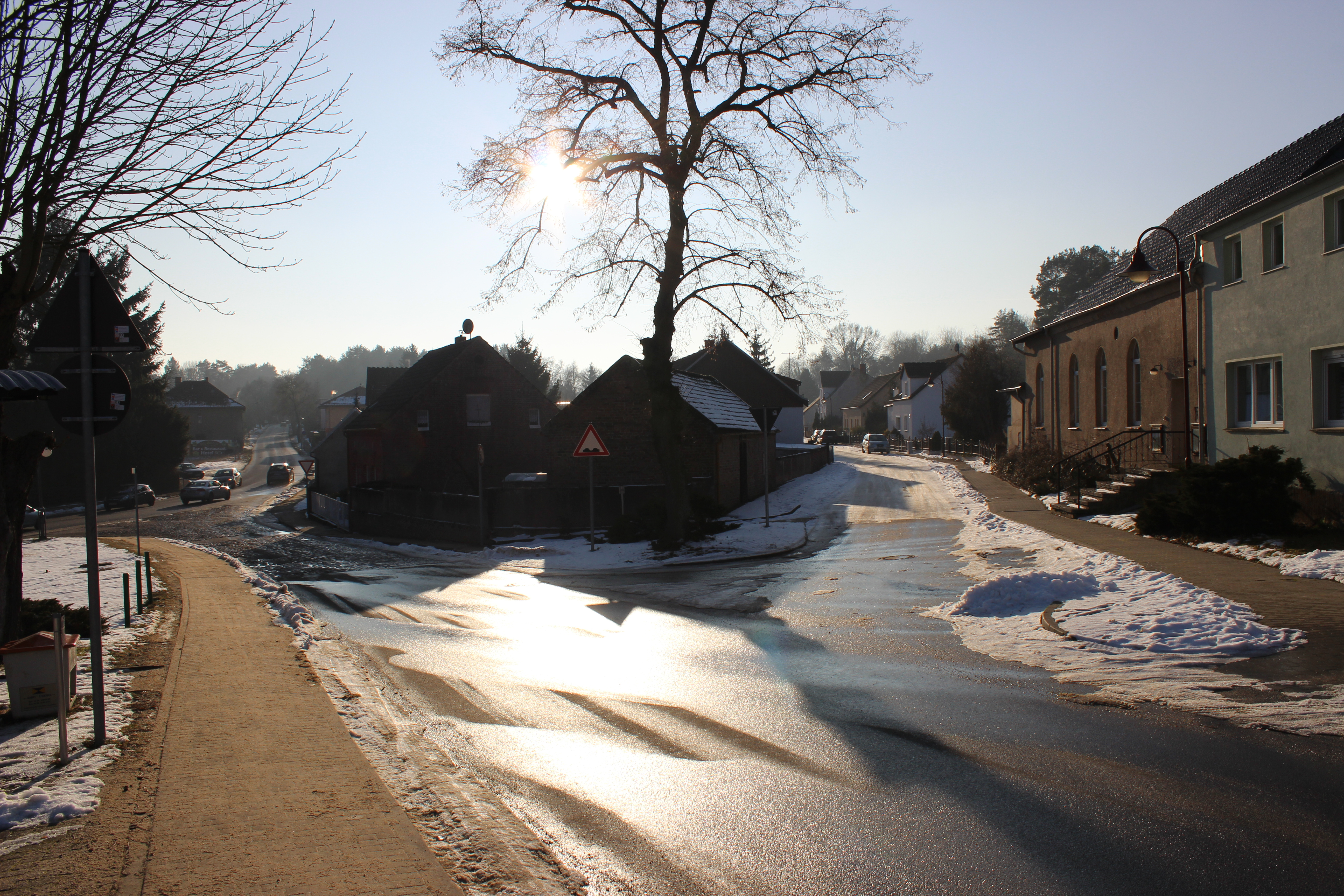 Blick auf den Petersdorfer Ortskern im Winter